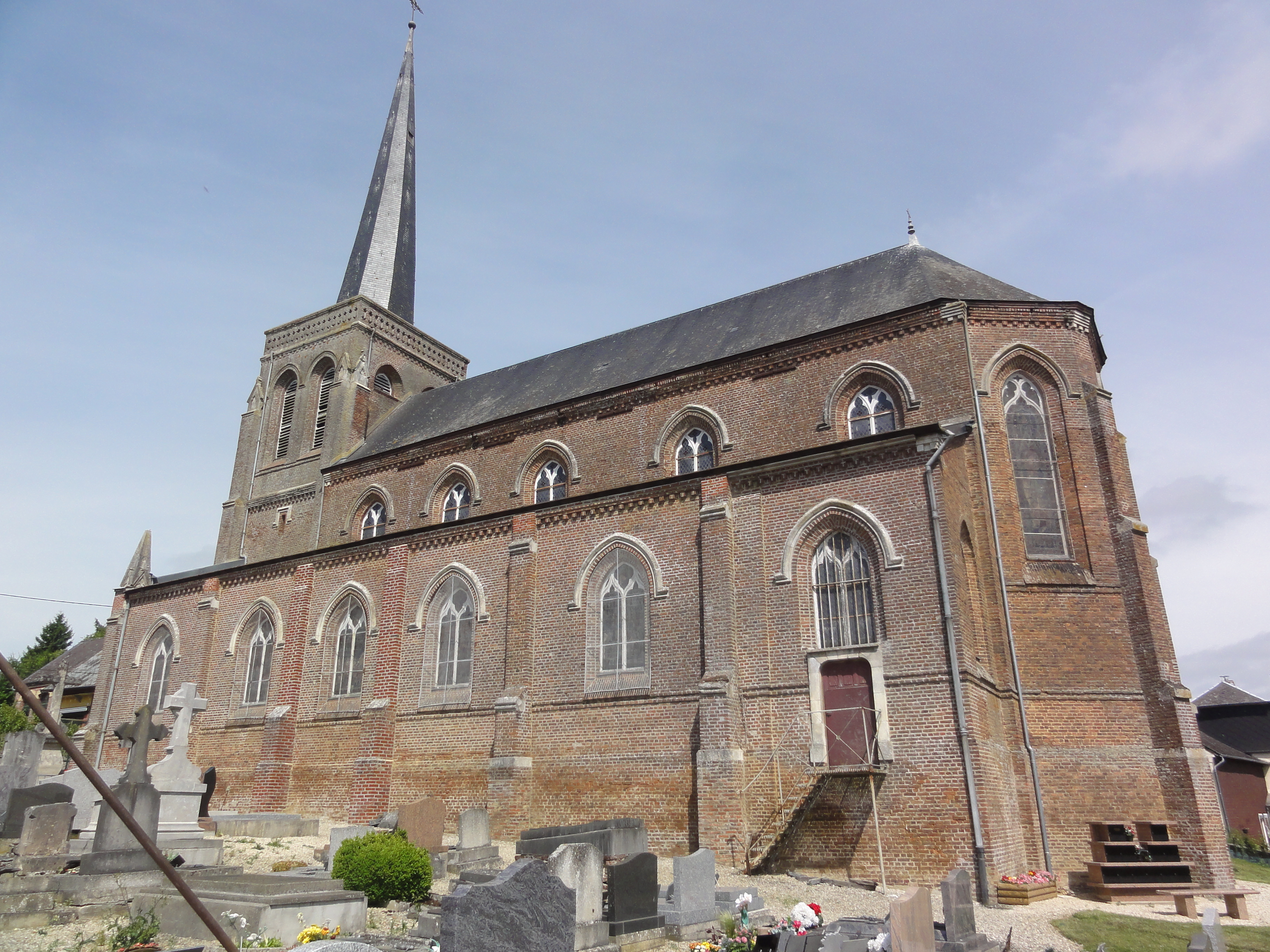 Résigny (Aisne) église Saint-Nicolas